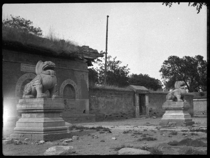 北京功德寺